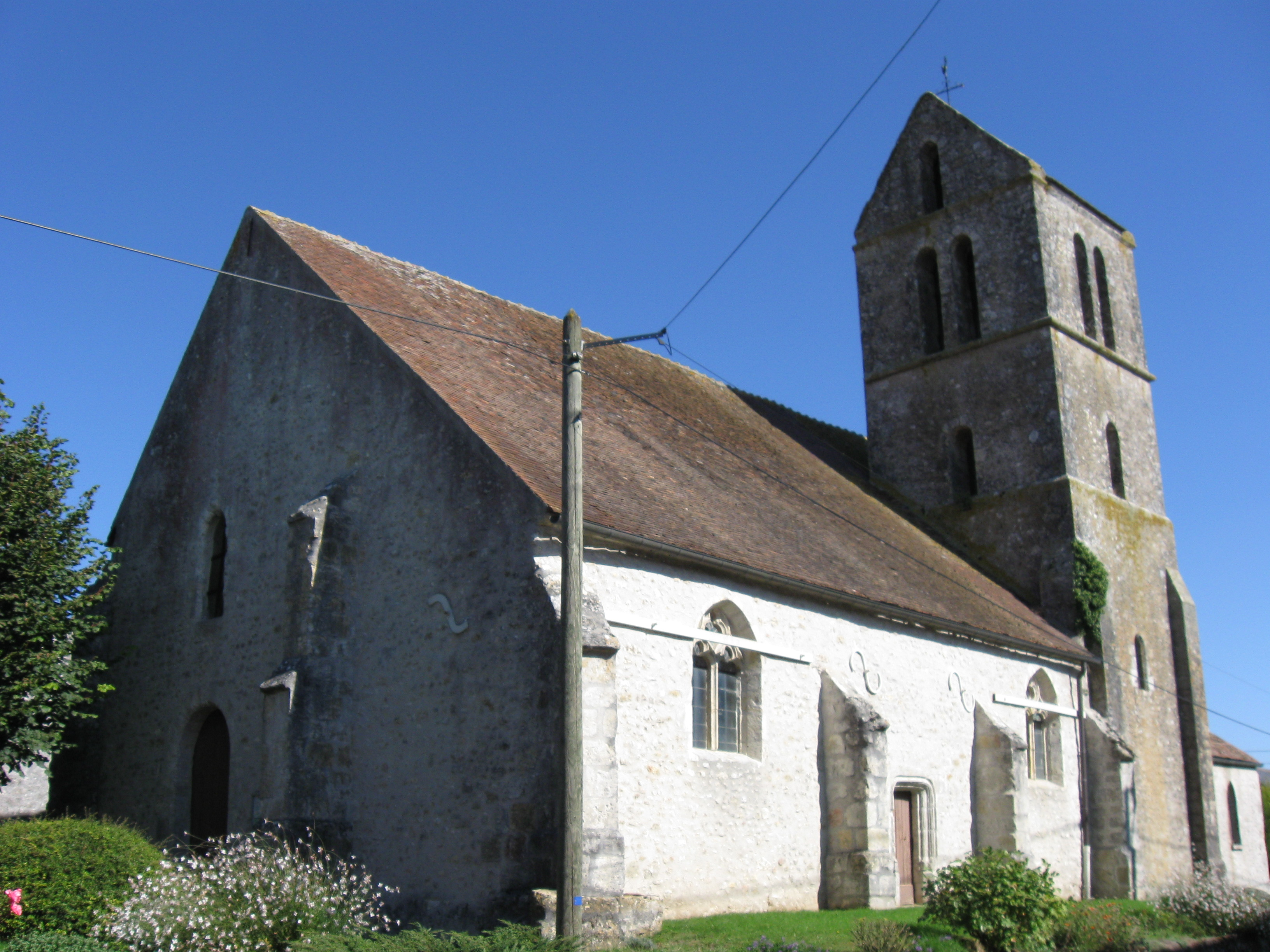 Église Saint-Vincent d'Ichy. (Seine-et-Marne, région Île-de-France).